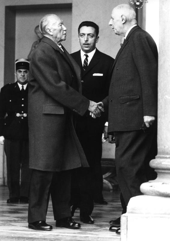 9.11.1964 Altbundeskanzler Konrad Adenauer in Paris